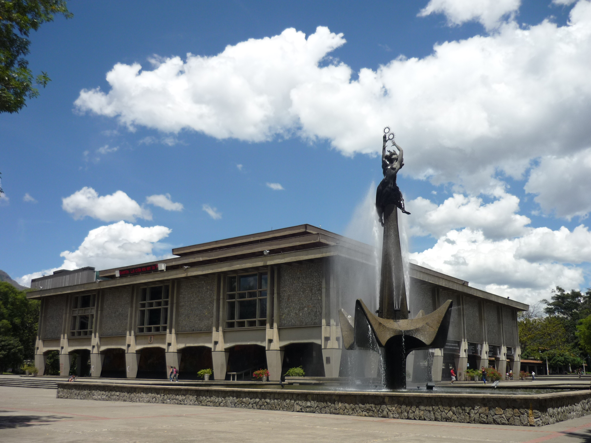 Vista de la biblioteca de la Universidad de Antioquia y la escultura del maestro Rodrigo Arenas Betancur, El Hombre Creador de Energía.